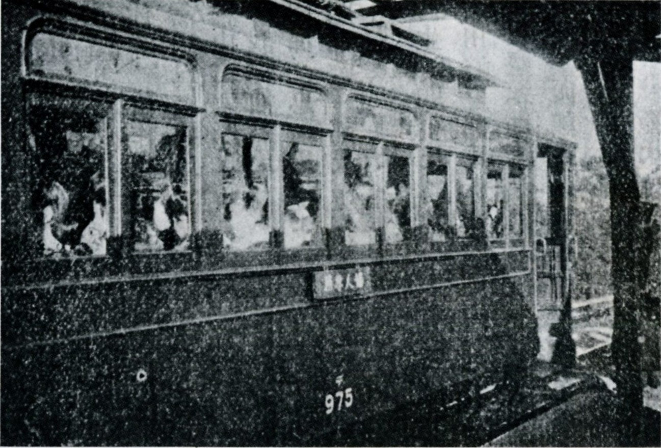 女子学生通学のため明治45年1月31日、はじめて中央線中野・昌平橋間に朝夕2回婦人専用電車が運転された。写真の車両は甲武鉄道引継ぎのデ963形。右書きで「婦人専用」と書かれている。日本国有鉄道百年史第5巻P486によれば、この写真は「鉄道時報」明治45年2月10日に掲載された。東京朝日新聞、読売新聞、都新聞(現・東京新聞)などで報道された。